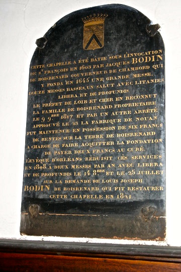 Plaque gravée au XXème siècle commémorant la construction de la chapelle de Boisrenard.